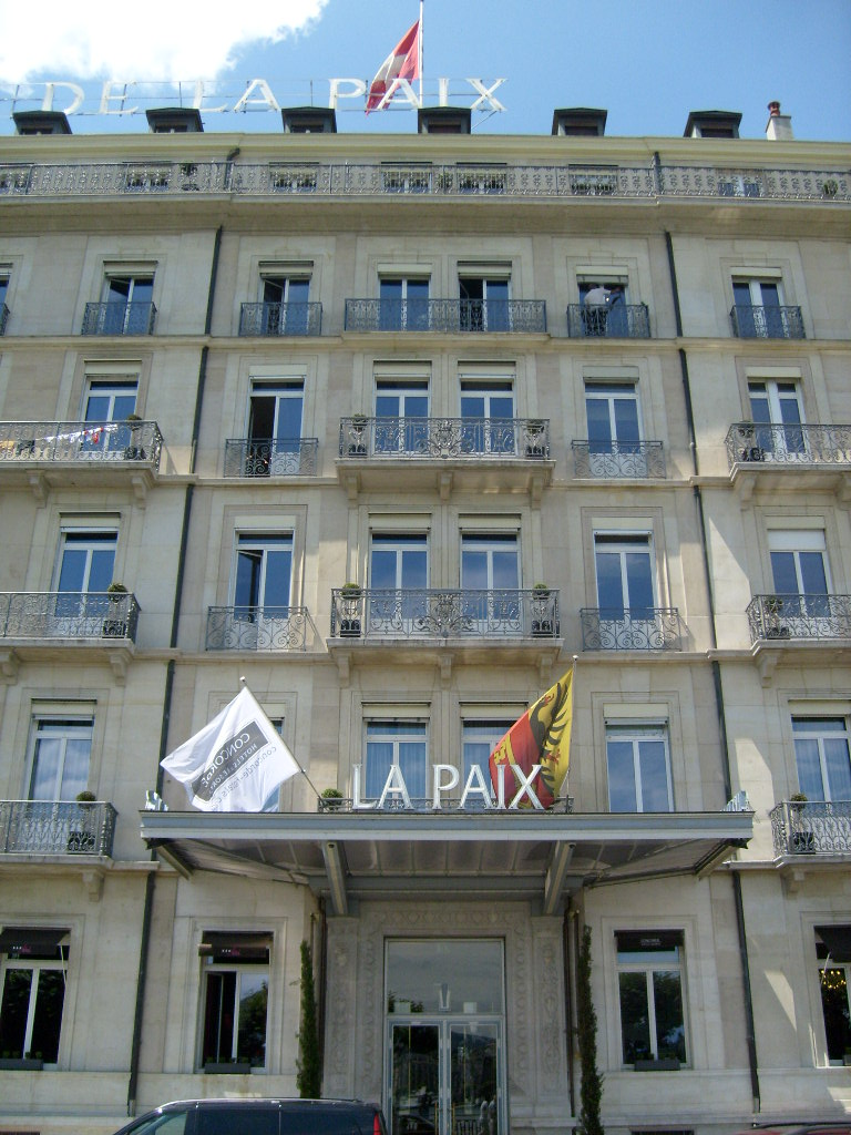 Hôtel de la Paix à Genève (Suisse)